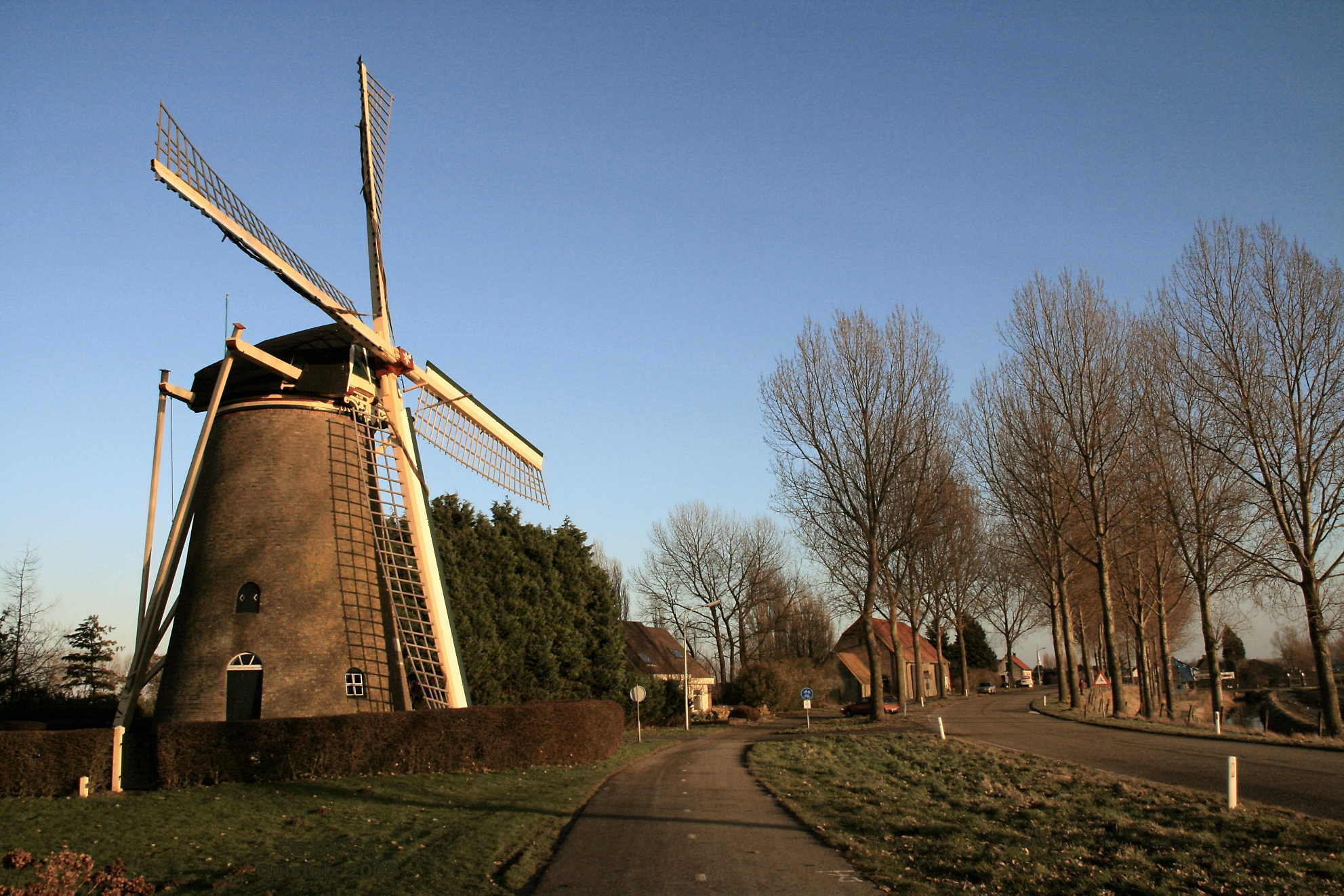 Den Bommel, windmolen De Bommelaer langs de dijk